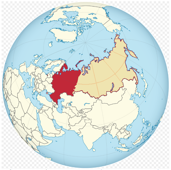 Rusia europea